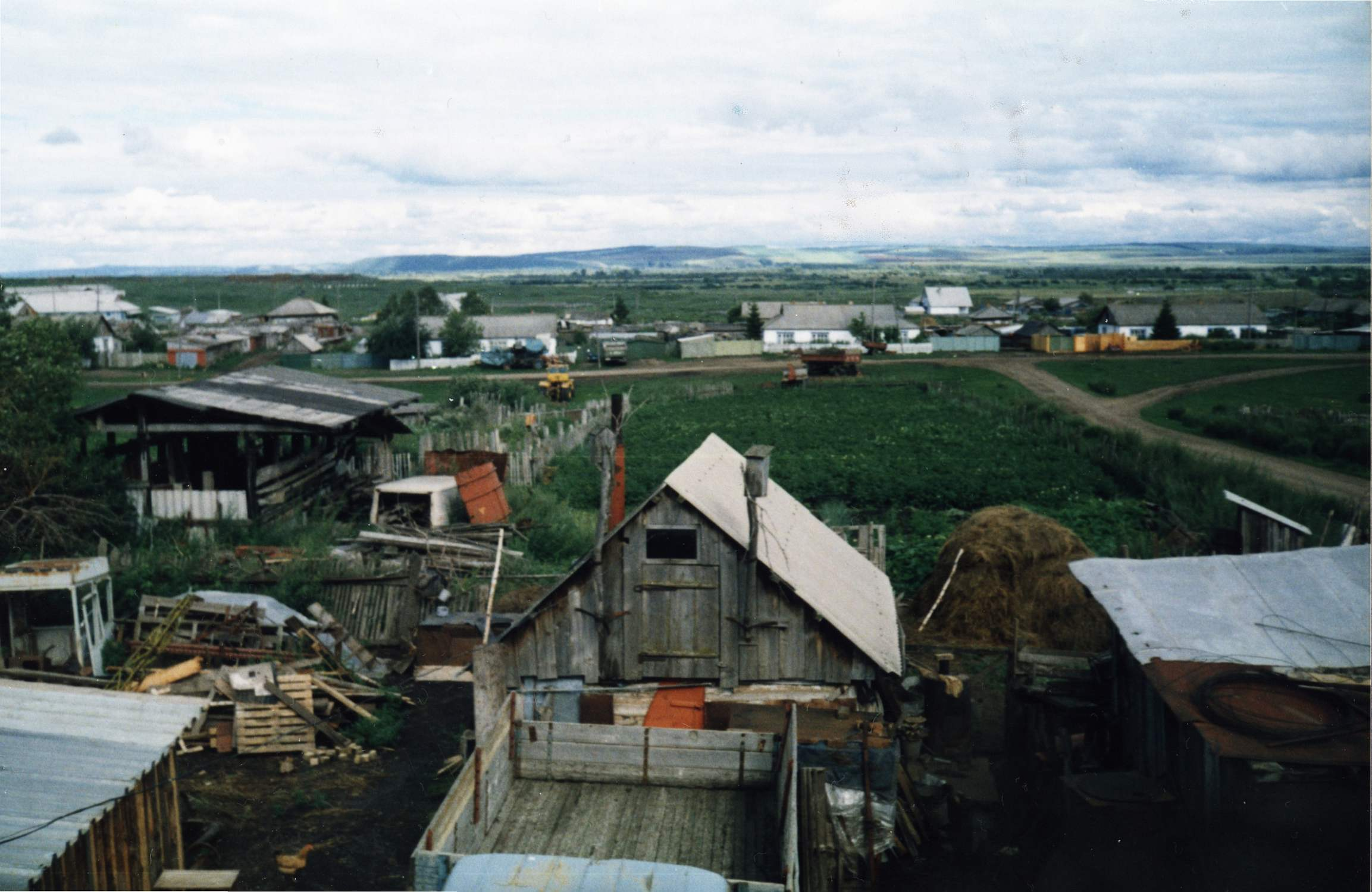 Вид на поселок и горы итп (на "подхоз") (Вид на восток, ~2005г)